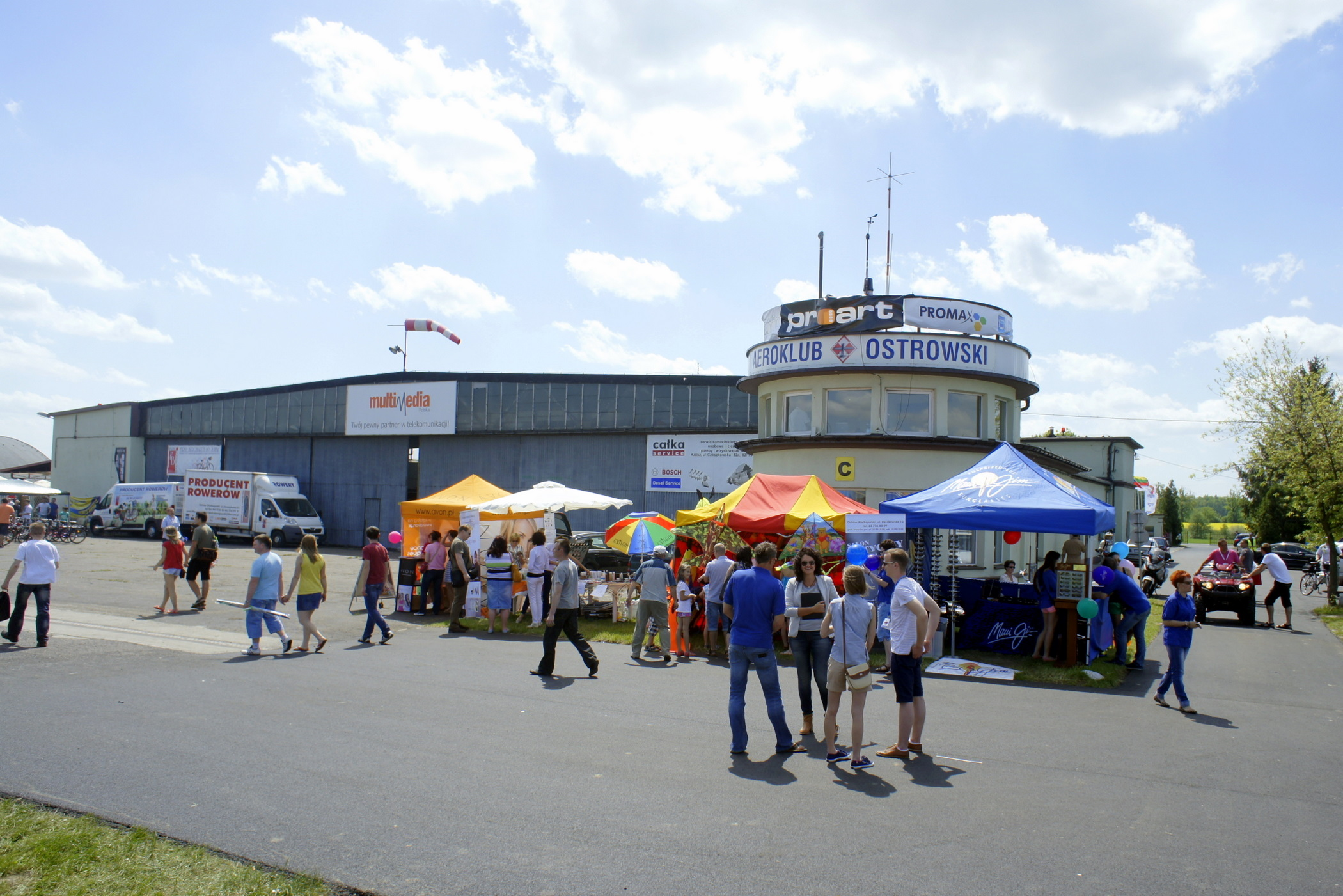 Lotnisko Aeroklubu Ostrowskiego w Michałkowie w dniach festynu w 2013 r.